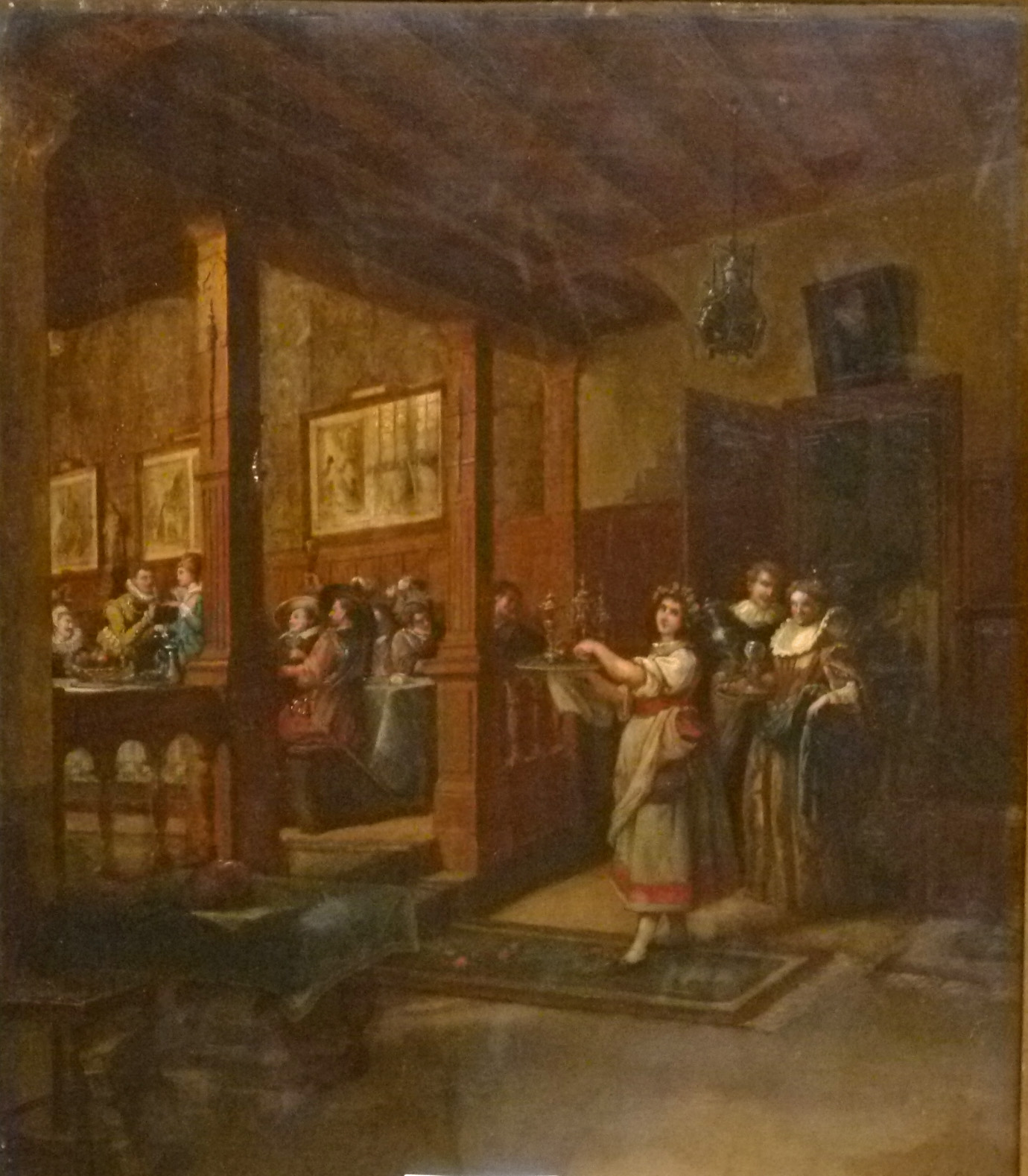 "Het feest" (1903), olieverf op mahoniehouten paneel (62 x 44 cm) door de Belgische schilder Eugène Siberdt (1851-1931); privécollectie